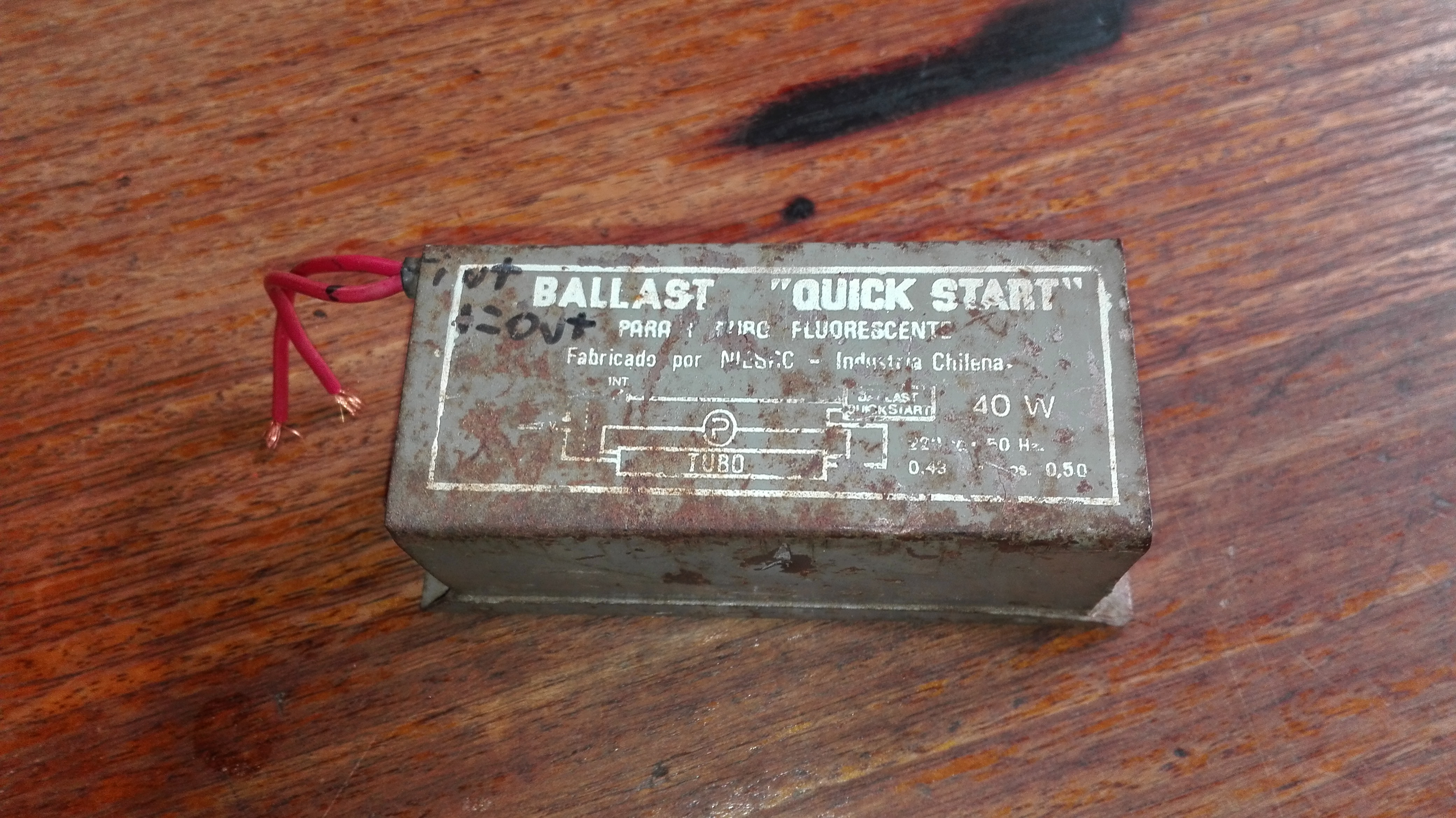 Balastro para tubo fluorecente.